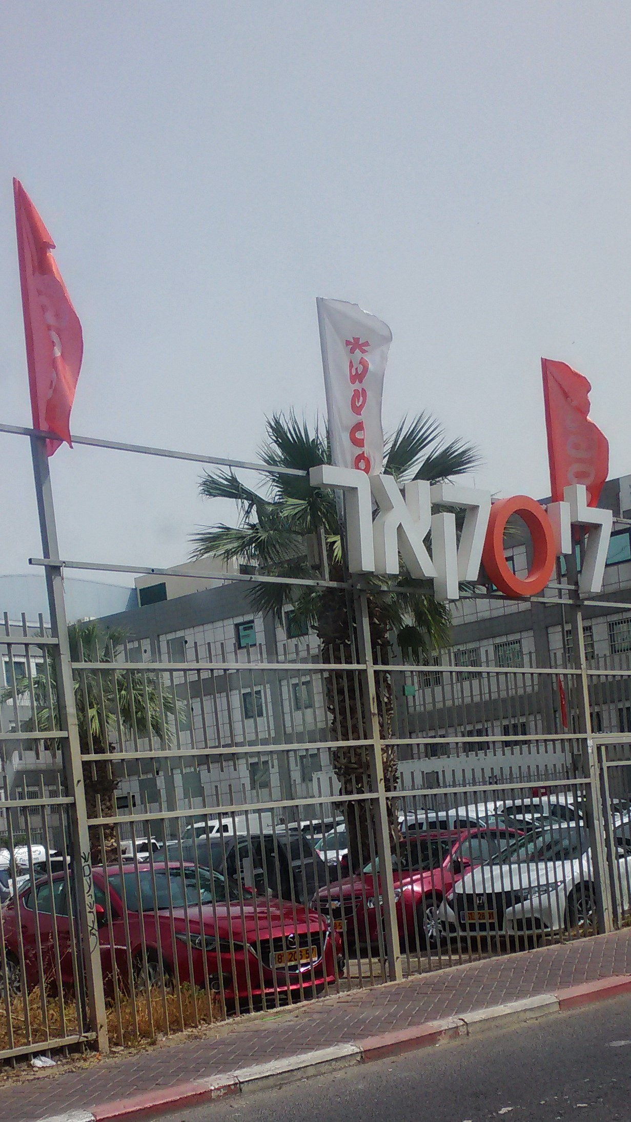 ליסקאר - מגרש למכירת מכוניות